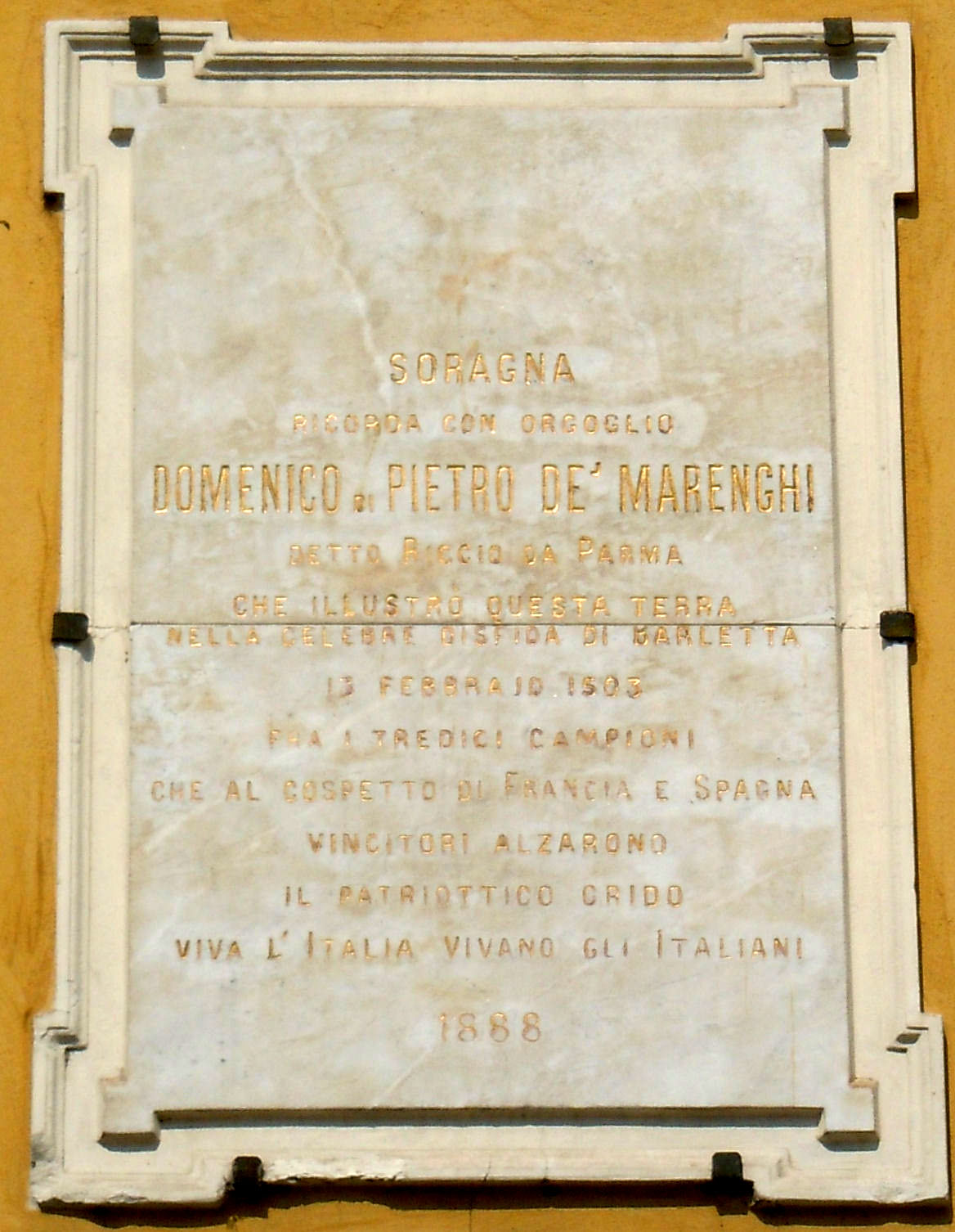 Soragna, lapide a Domenico e Pietro De'Marenghi.